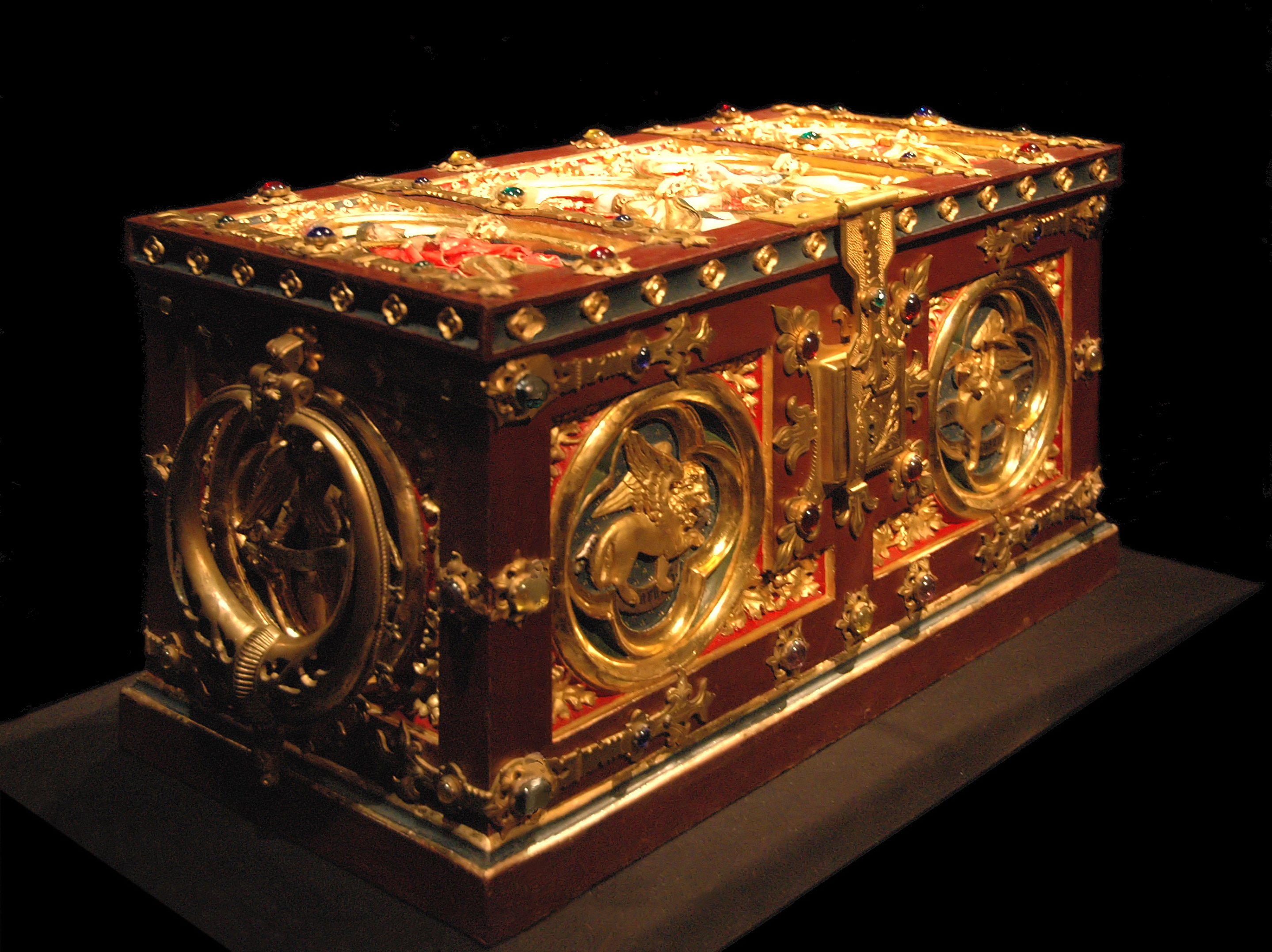 Historischer Altfrid-Schrein aus dem Essener Domschatz